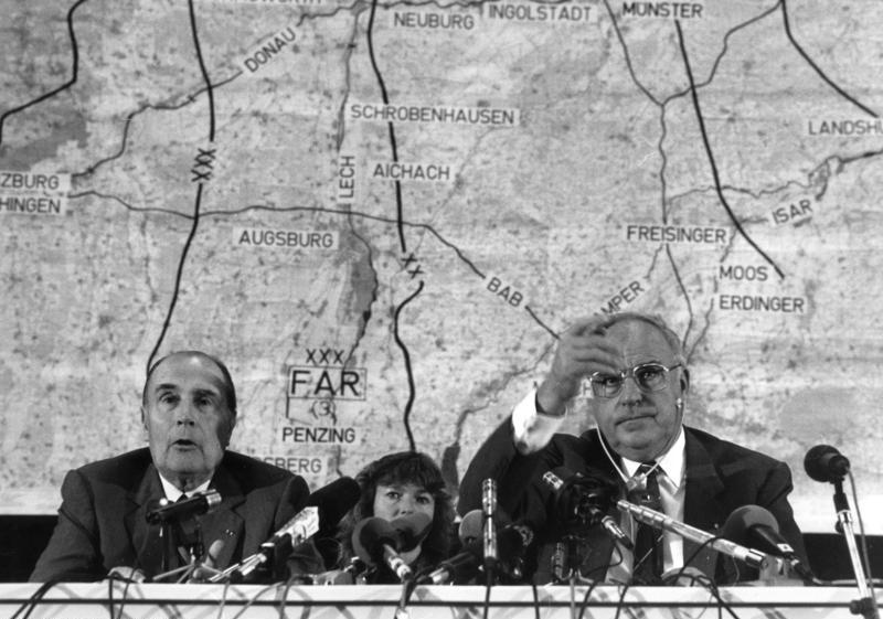 Am 24. September 1987 nahmen Bundeskanzler Dr.Helmut Kohl und der französische Staatspräsident Francois Mitterrand an der deutsch-französischen Heeresübung Kecker Spatz teil. Die Übung wurde vom II. deutschen Korps mit 55.000 Mann und von der französischen schnellen Eingreiftruppe (FAR) mit 20.000 Mann in Bayern und Baden-Württemberg durchgeführt. Es war dies die bisher größte deutsch-französische Übung. Im Bild: Staatspräsident Mitterrand und Bundeskanzler Kohl (v.l.n.r.) während einer Pressekonferenz auf dem Luftwaffenstützpunkt Manching